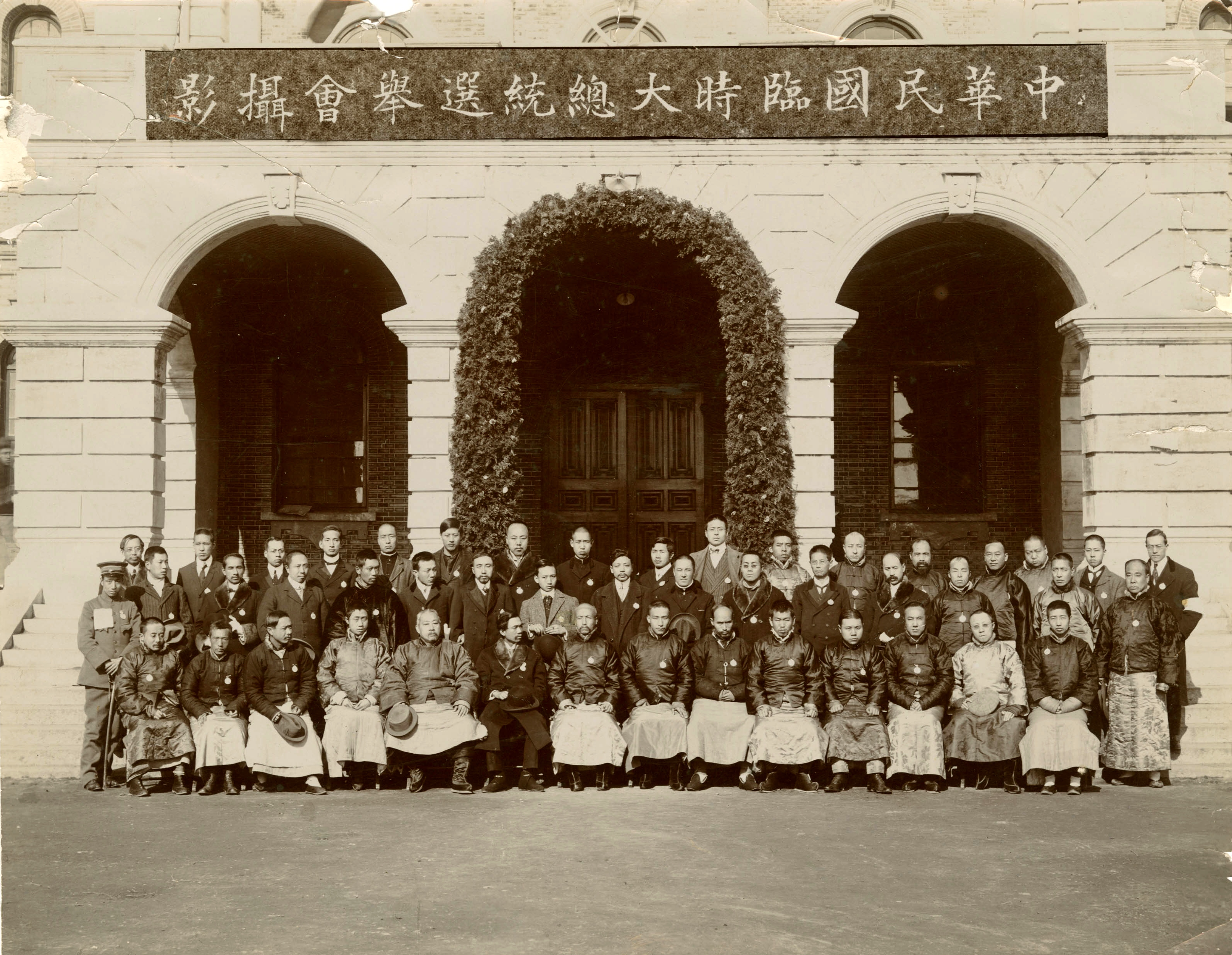 中華民國臨時大總統選舉會攝影